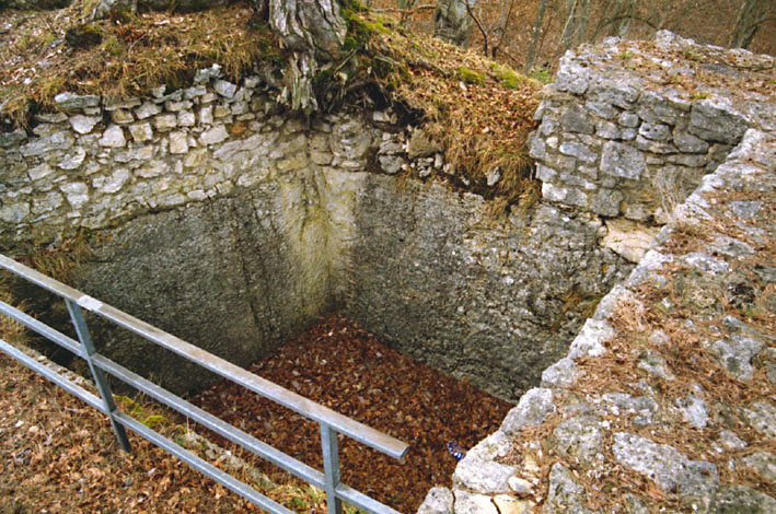 Ruine Alt-Schauenburg, Frenkendorf, Keller oder Filterzisterne